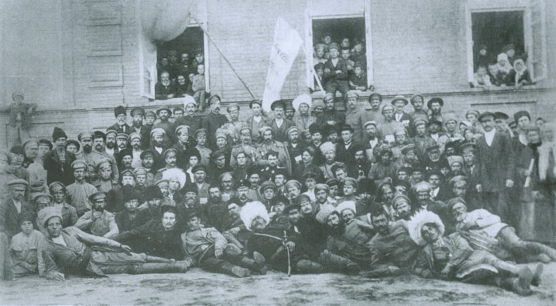 Делегати Першого з'їзду Вільного козацтва у Чигирині. Жовтень 1917 року.